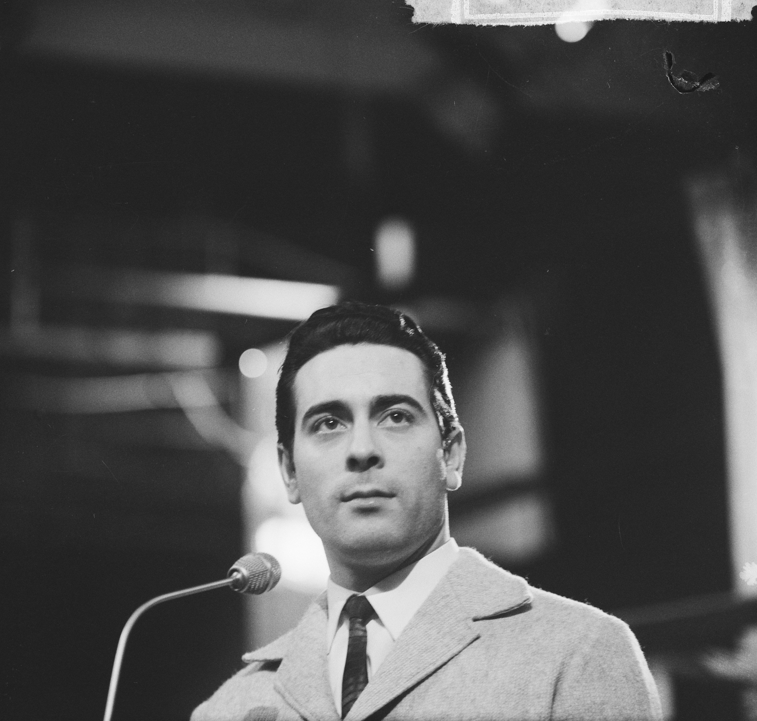 Collectie / Archief : Fotocollectie Anefo Reportage / Serie : [ onbekend ] Beschrijving : Finale Nationaal Songfestival 1965, Gert Timmerman Datum : 13 februari 1965 Trefwoorden : artiesten, muziek, portretten, songfestivals, zanger Persoonsnaam : Timmerman, Gert Instellingsnaam : Nationaal Songfestival Fotograaf : Nijs, Jac. de / Anefo Auteursrechthebbende : Nationaal Archief Materiaalsoort : Negatief (zwart/wit) Nummer archiefinventaris : bekijk toegang 2.24.01.03 Bestanddeelnummer : 917-4314